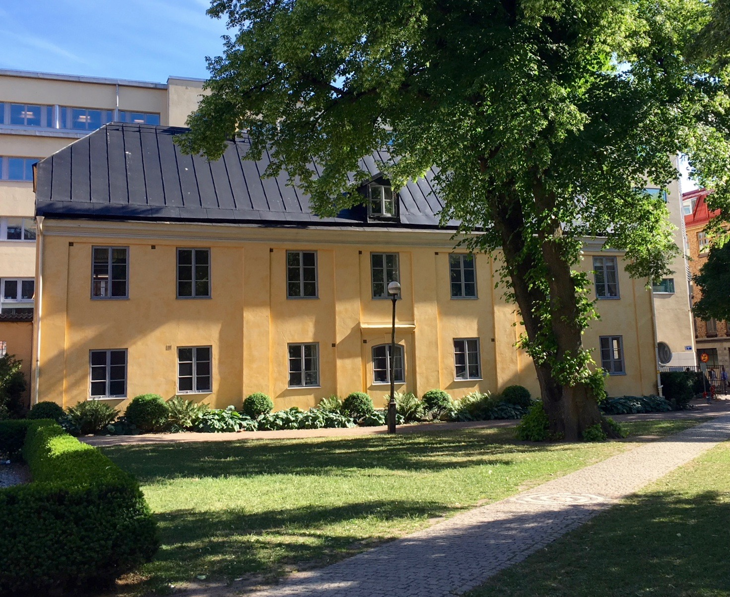 Kronhusparken med huset vid Postgatan 4. Huset är byggnadsminne sedan 24 oktober 1968. Lagskydd, BBR.